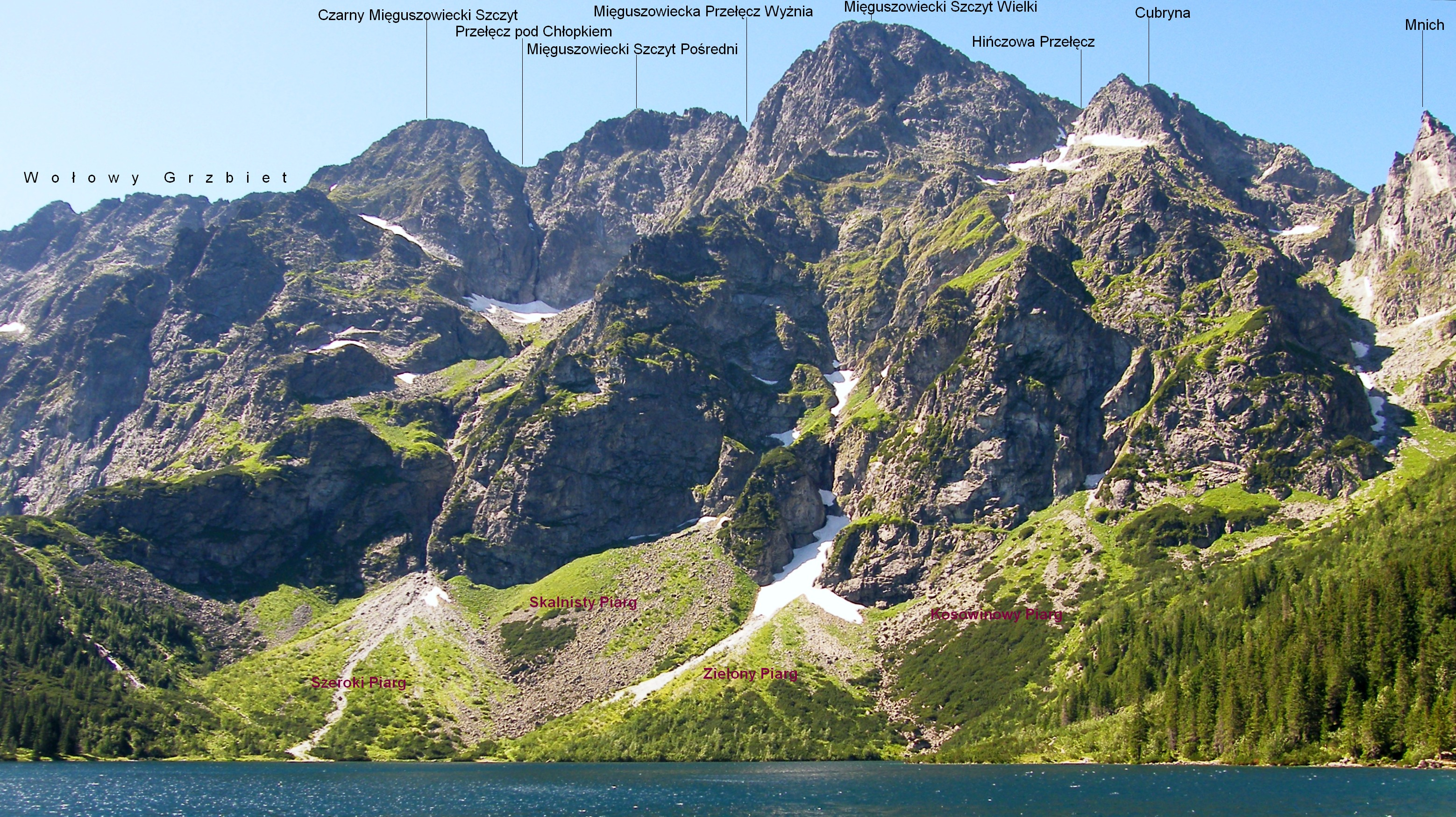 Szczyty nad Morskim Okiem w Tatrach